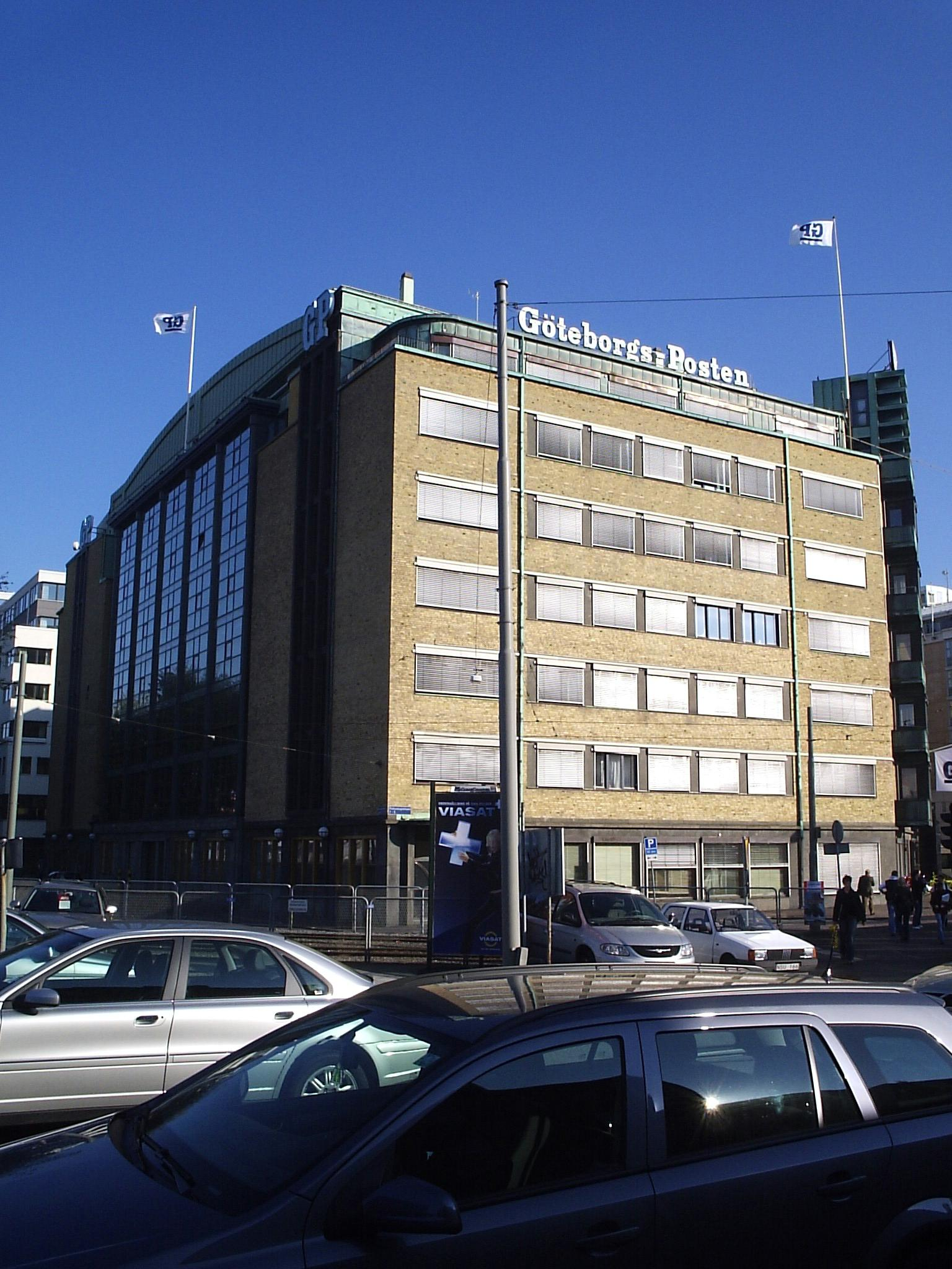 GP-huset i Göteborg, den 11 oktober 2005. Bilden är fotograferad av Harri Blomberg. 12 oktober 2005 kl.21.09 Västgöten 1536x2048 (409553 bytes) (GP-huset i Göteborg, den 11 oktober 2005. Bilden är fotograferad av Harri Blomberg. GFDL )